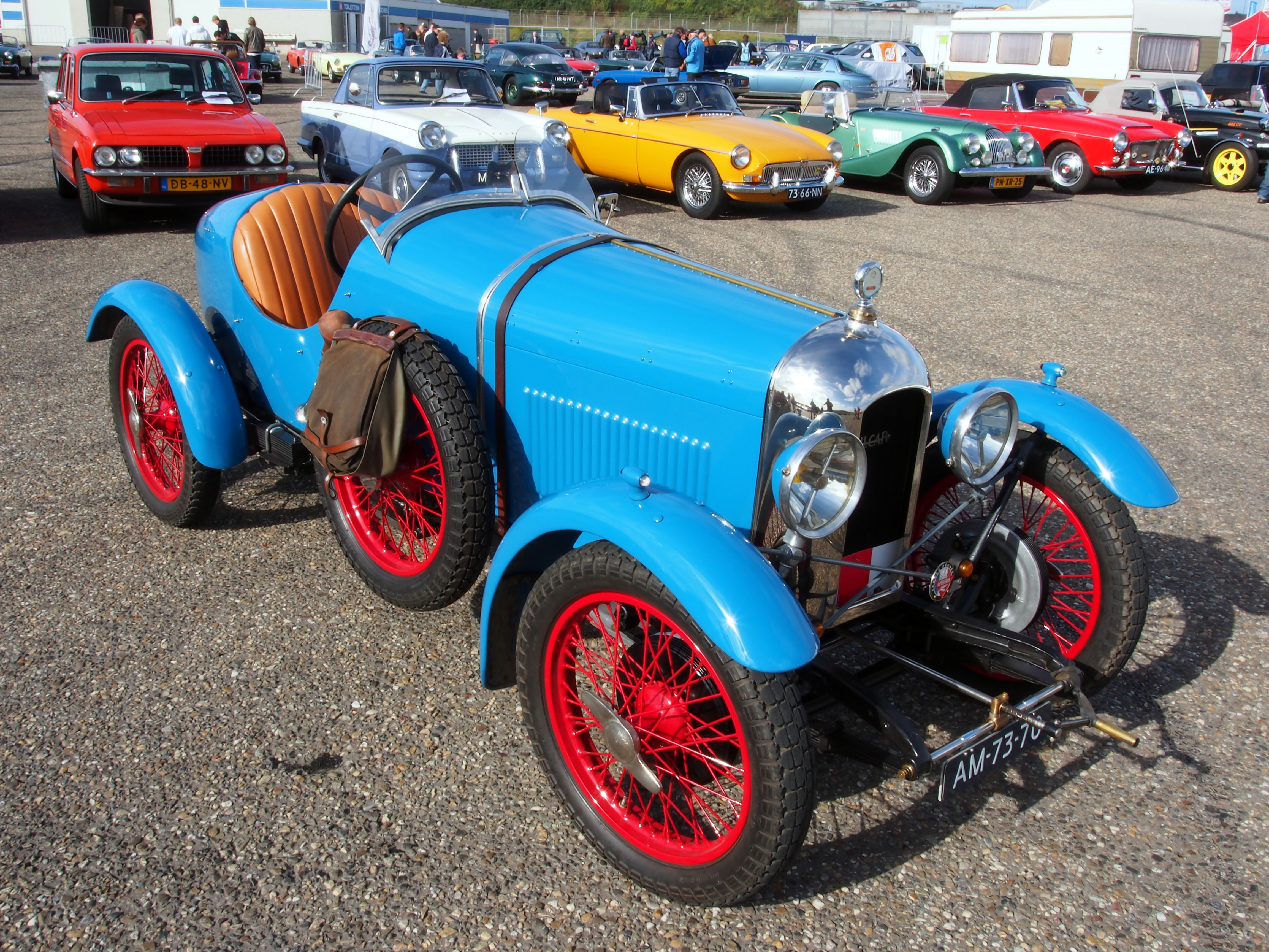 Blue 1927 Amilcar CGSS